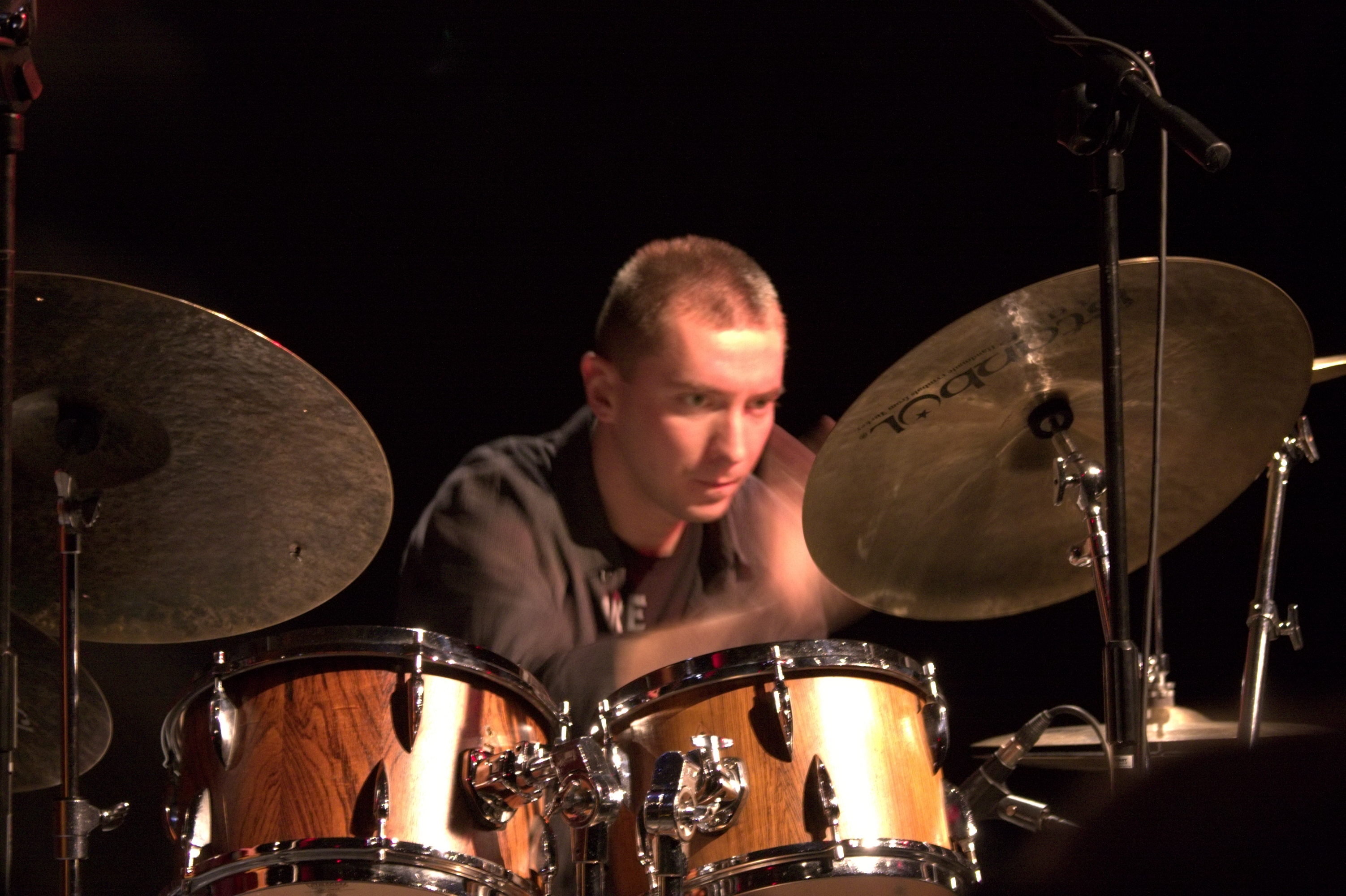 KRAKÓW, POLSKA - 6 GRUDNIA: Michał Miśkiewicz (drums) z grupy Marcin Wasilewski Trio podczas ostatniego koncertu IV Krakowskiej Jesieni Jazzowej, który odbył się w Muzeum Sztuki i Techniki Japońskiej Manggha 6 grudnia 2009 w Krakowie, Polska. (foto: Wojciech Migda)